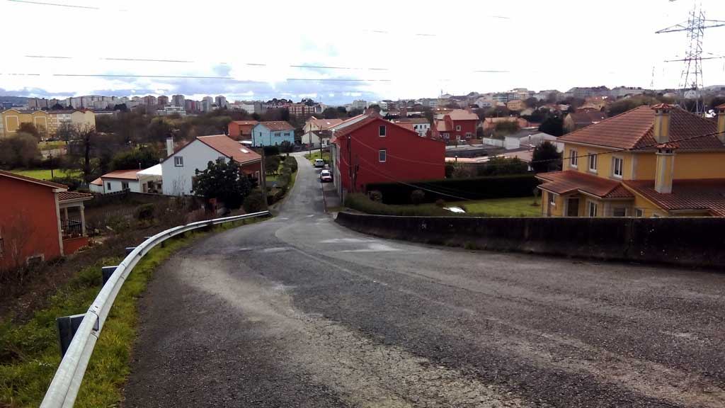 Vista do Espiño, Santa Icía, Ferrol.